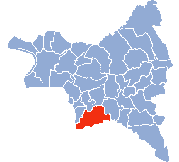 Auteur Hervé SUAUDEAU Licensing Catégorie:Cartes de Seine-saint-Denis Catégorie:Montreuil (Seine-Saint-Denis)